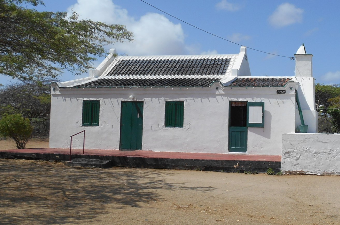 Arubaans Kunukuhuis